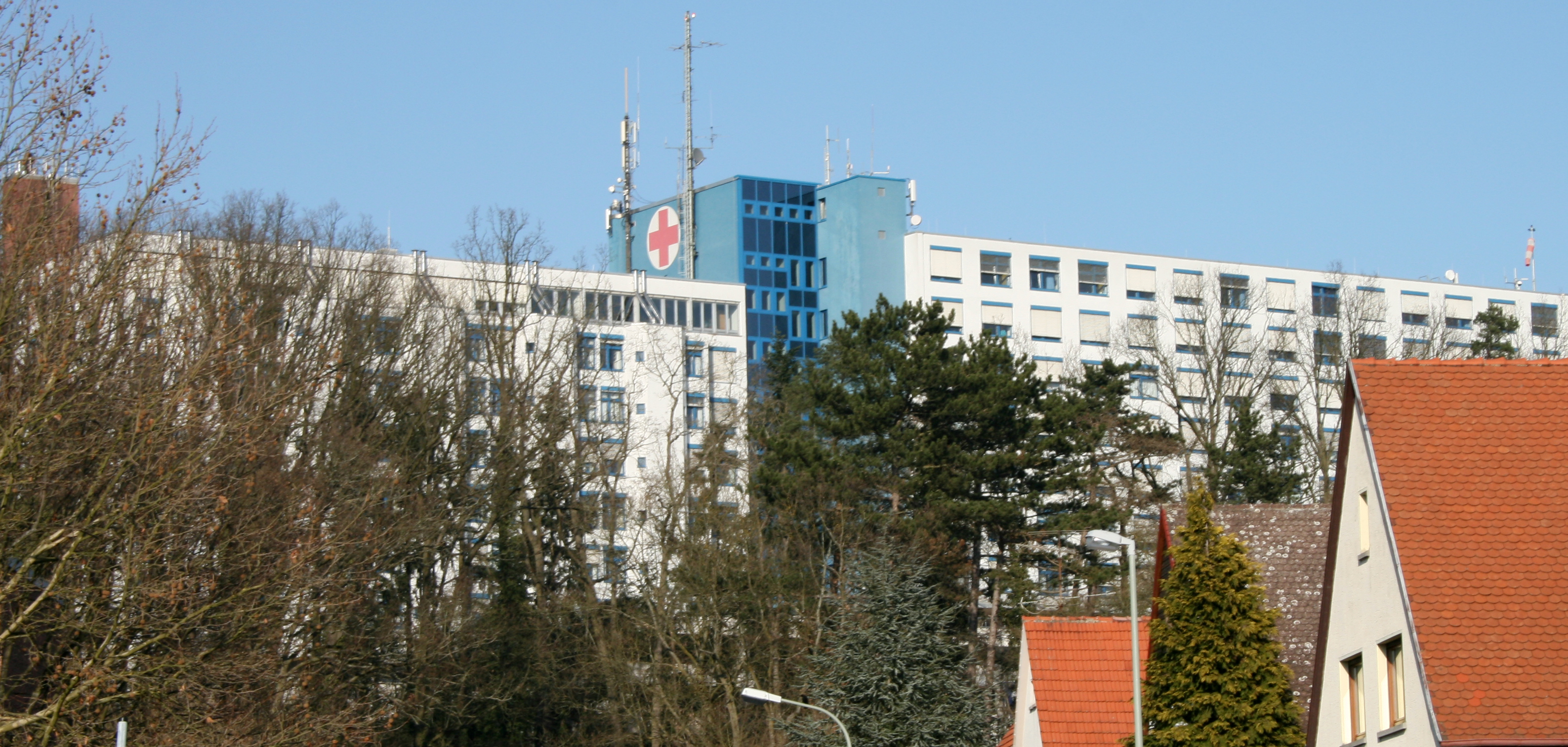 Krankenhaus St. Vincenz, Limburg an der Lahn, Deutschland